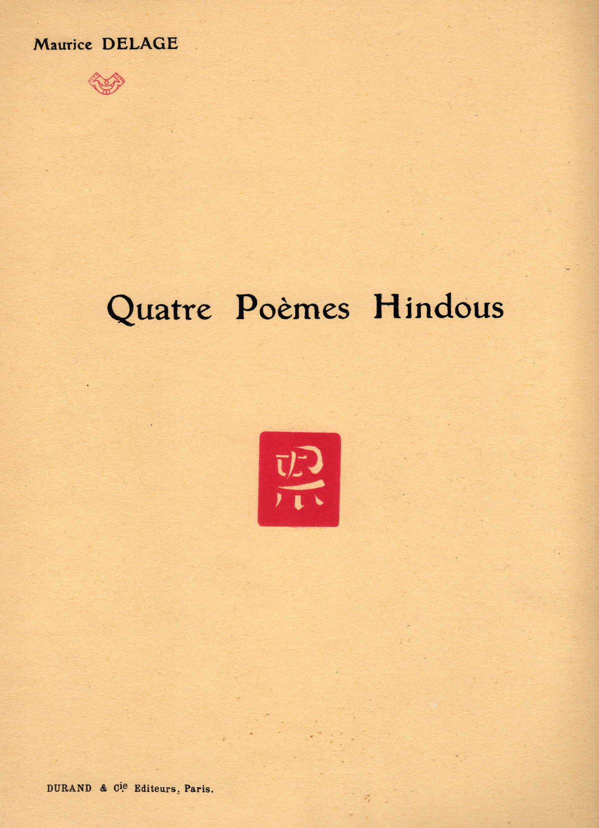 Delage - Quatre poèmes hindous